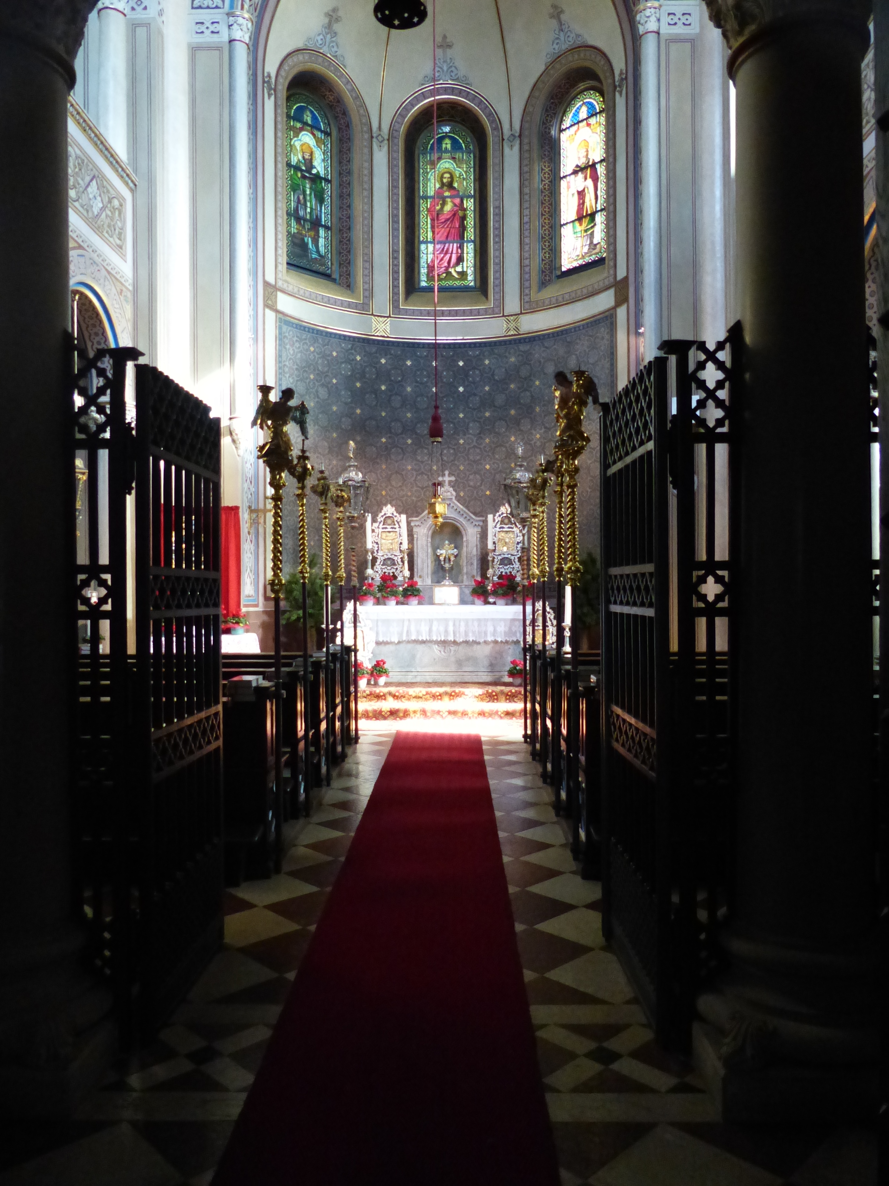 Bad Reichenhall: Alte Saline - Salinenkapelle St. RupertusThis is a photograph of an architectural monument.